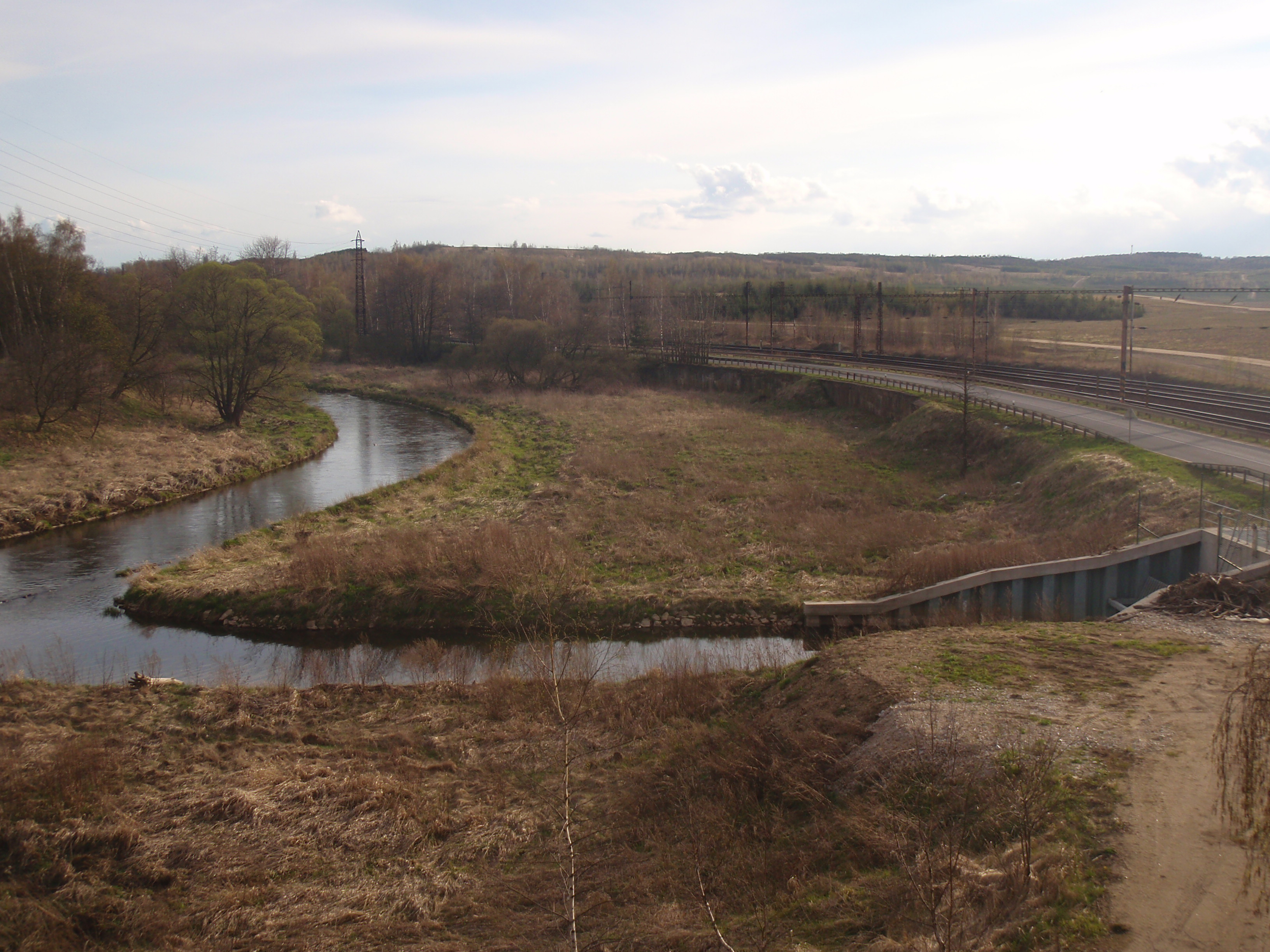 Nápusť z řeky Ohře